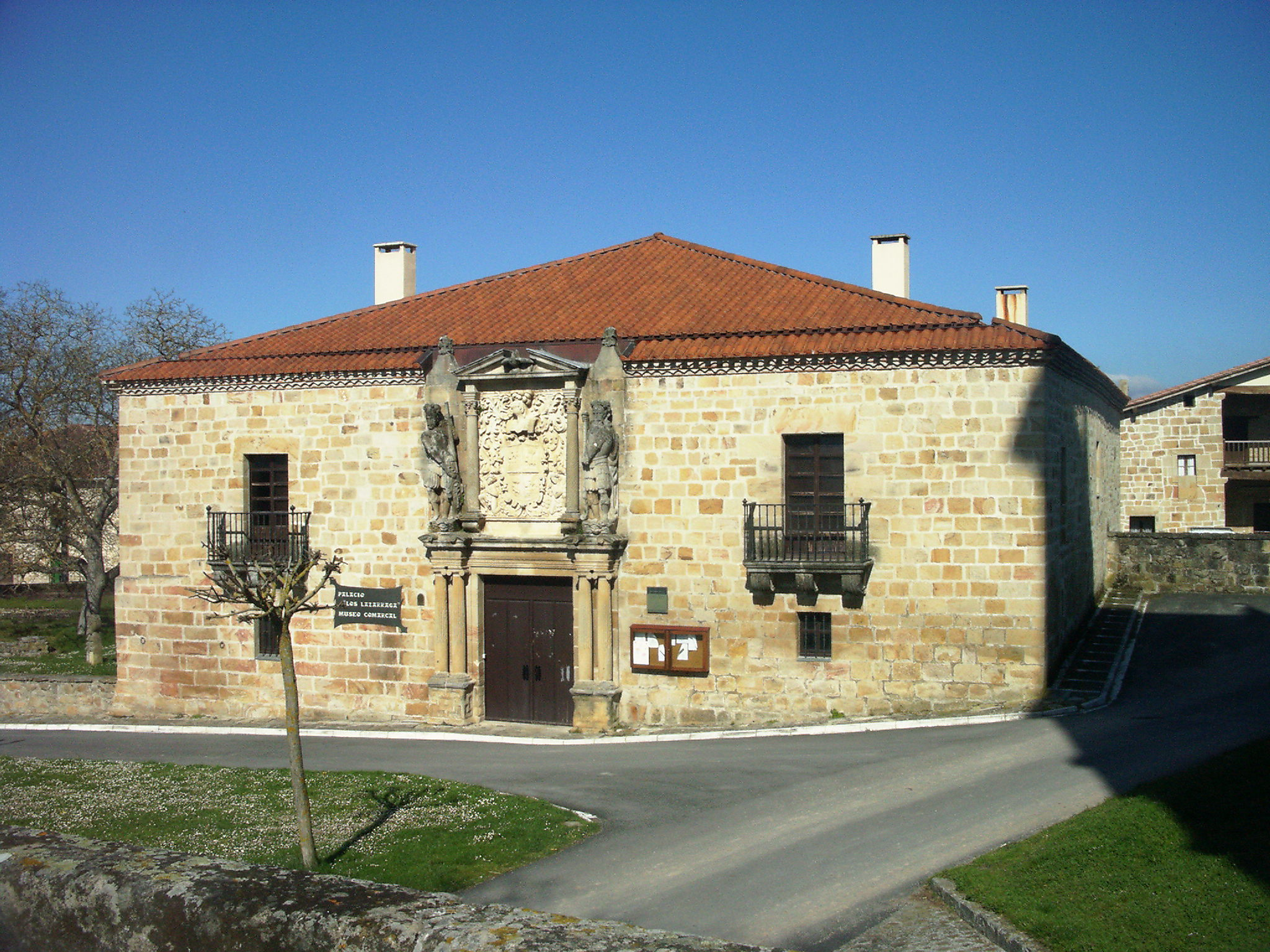 Zalduondoko Lazarragatarren jauregia.